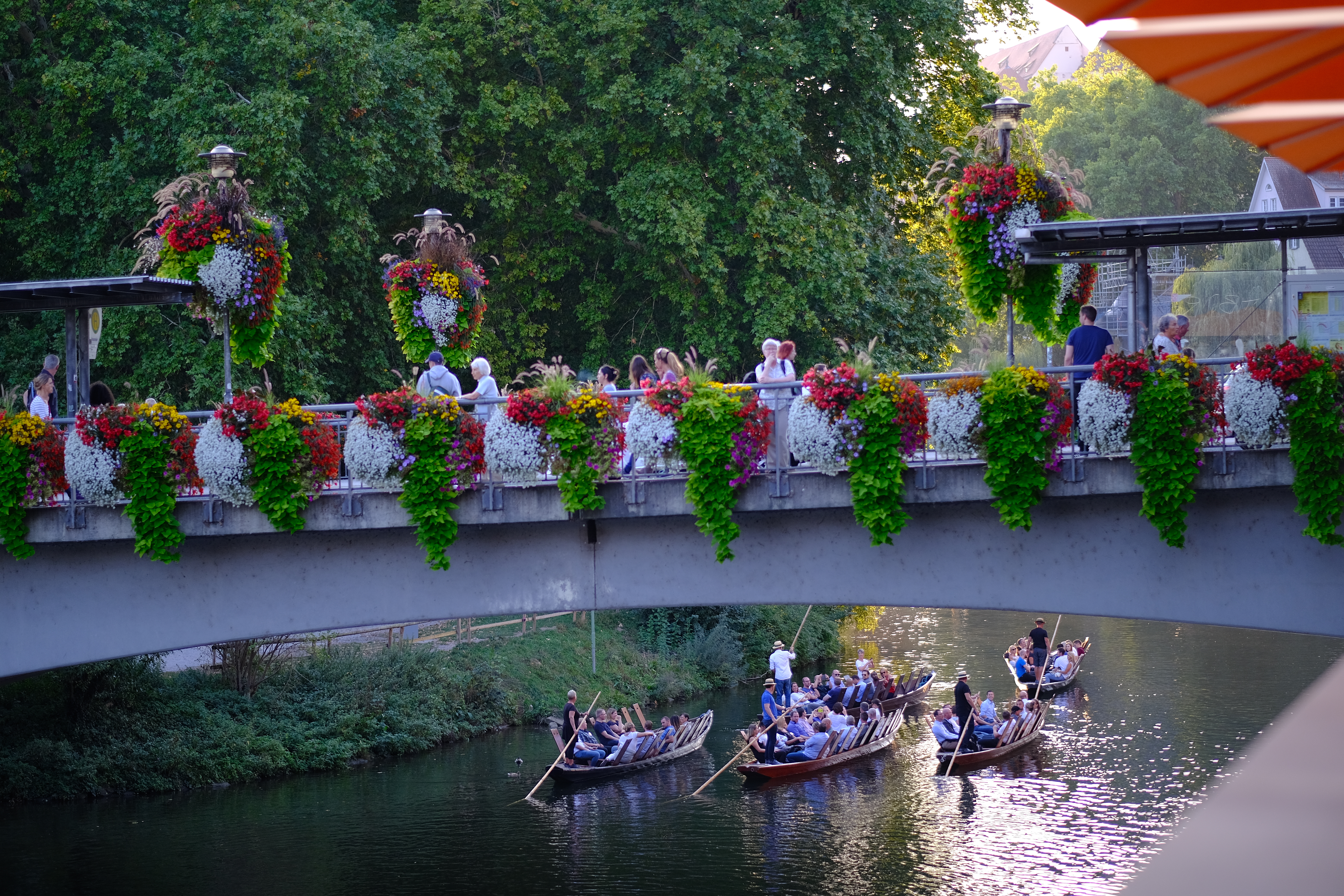 Stocherkähne und Neckarbrücke in Tübingen im September 2018